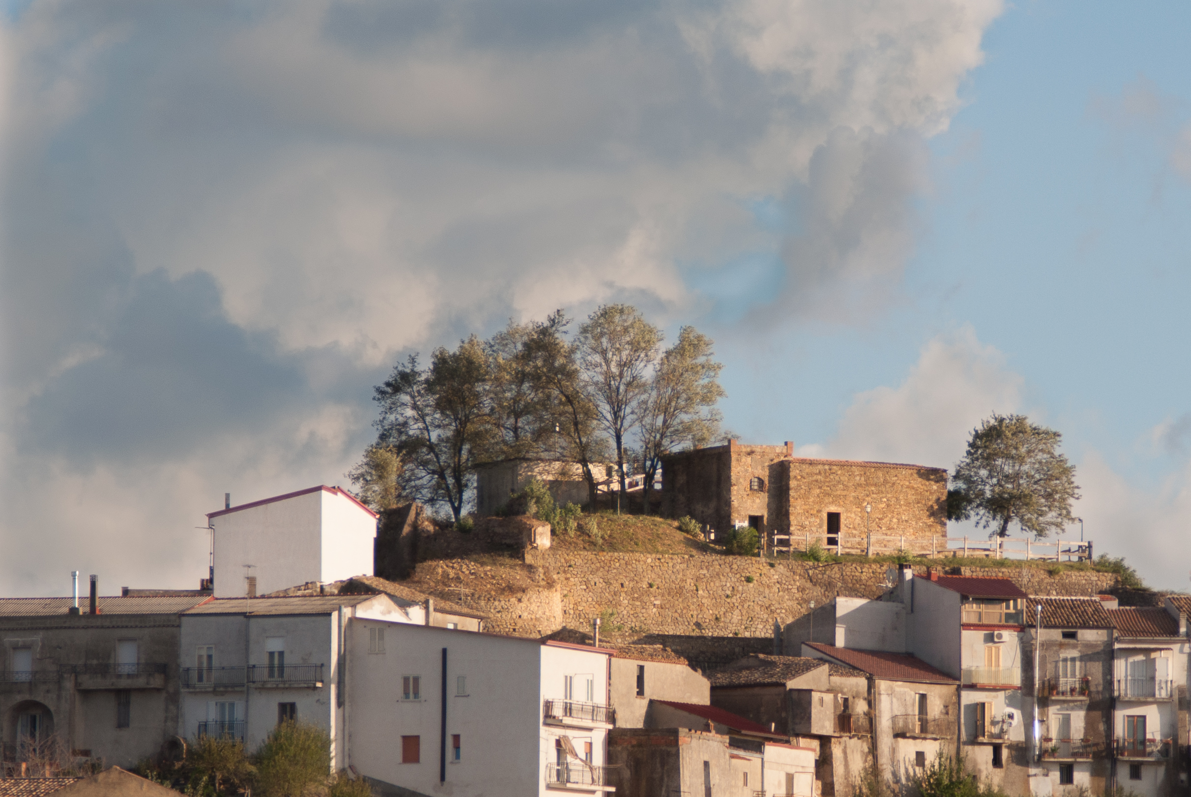 Castello Normanno This is a photo of a monument which is part of cultural heritage of Italy.